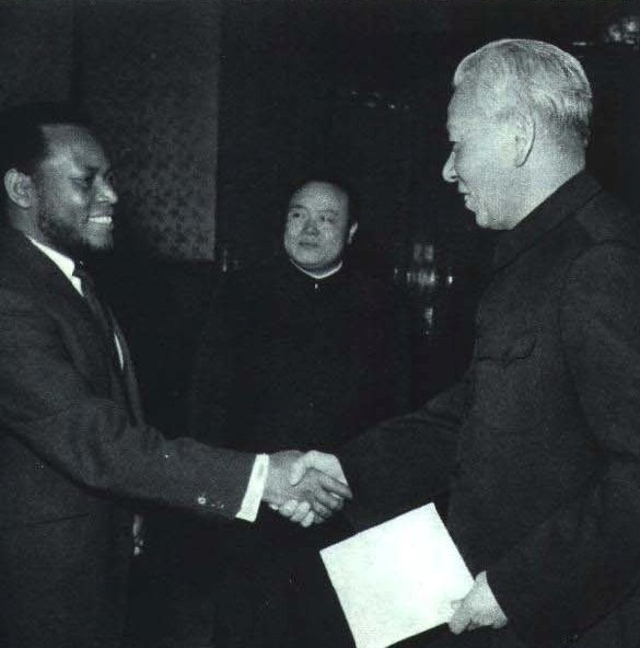 1964-03 1964年 肯尼亚首任驻华大使亨利·恩齐奥卡·穆利向刘少奇递交国书